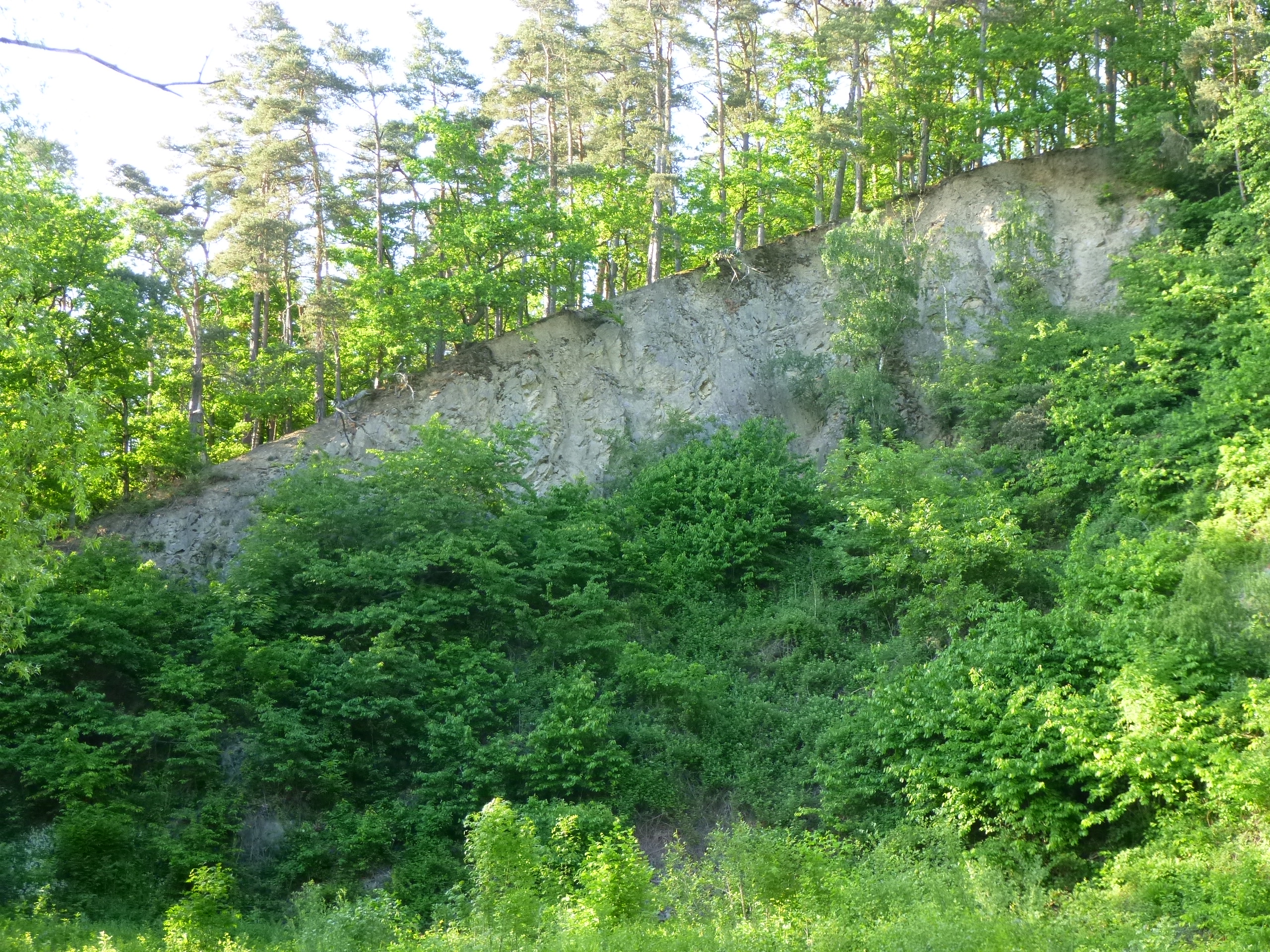 Steinbruch nördlich von Anning/Stadt Bogen. Der Steinbruch gehört zu den Geotopen im Landkreis Straubing-Bogen und hat die Nummer 278A006.